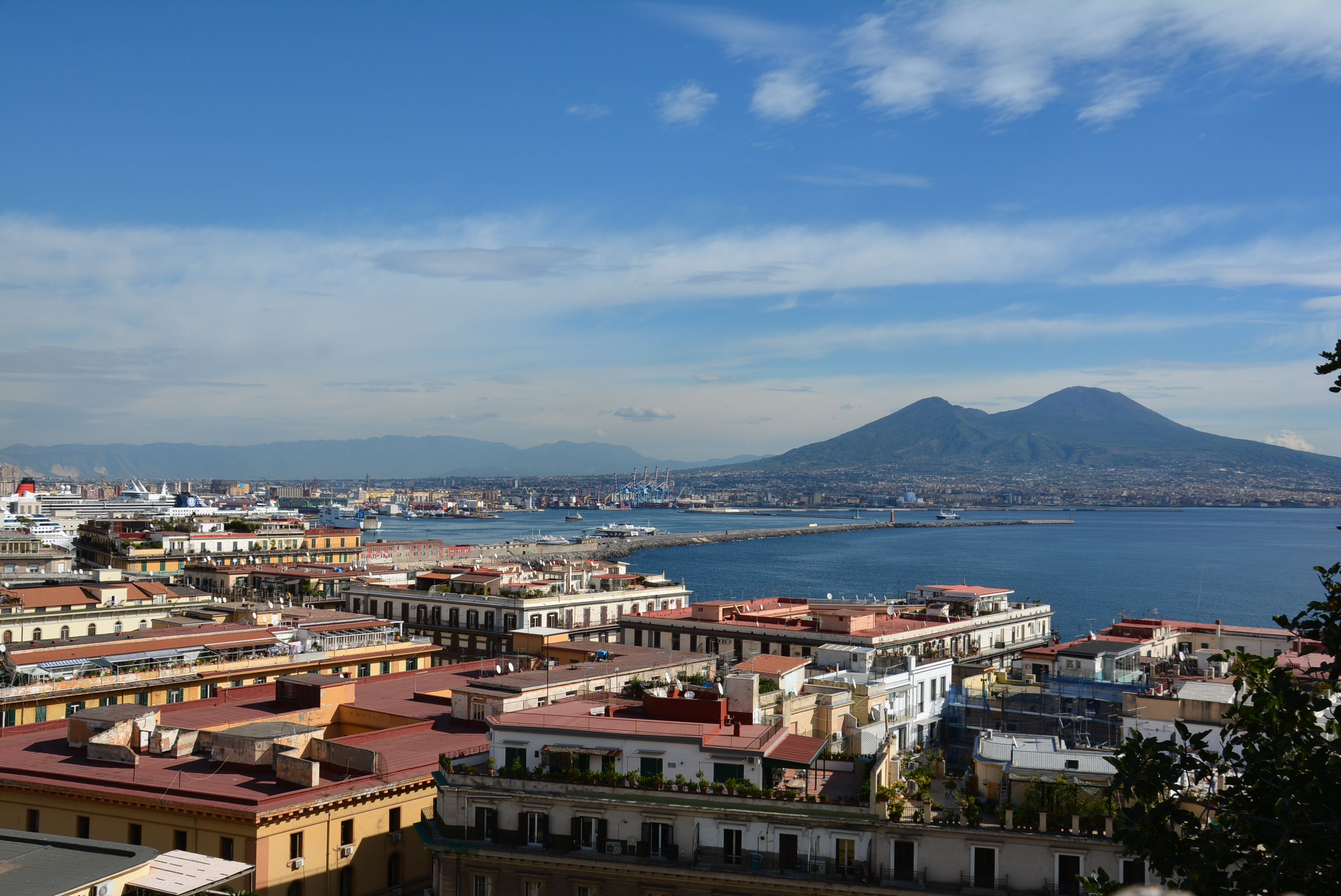 Veduta di Napoli da Pizzofalcone